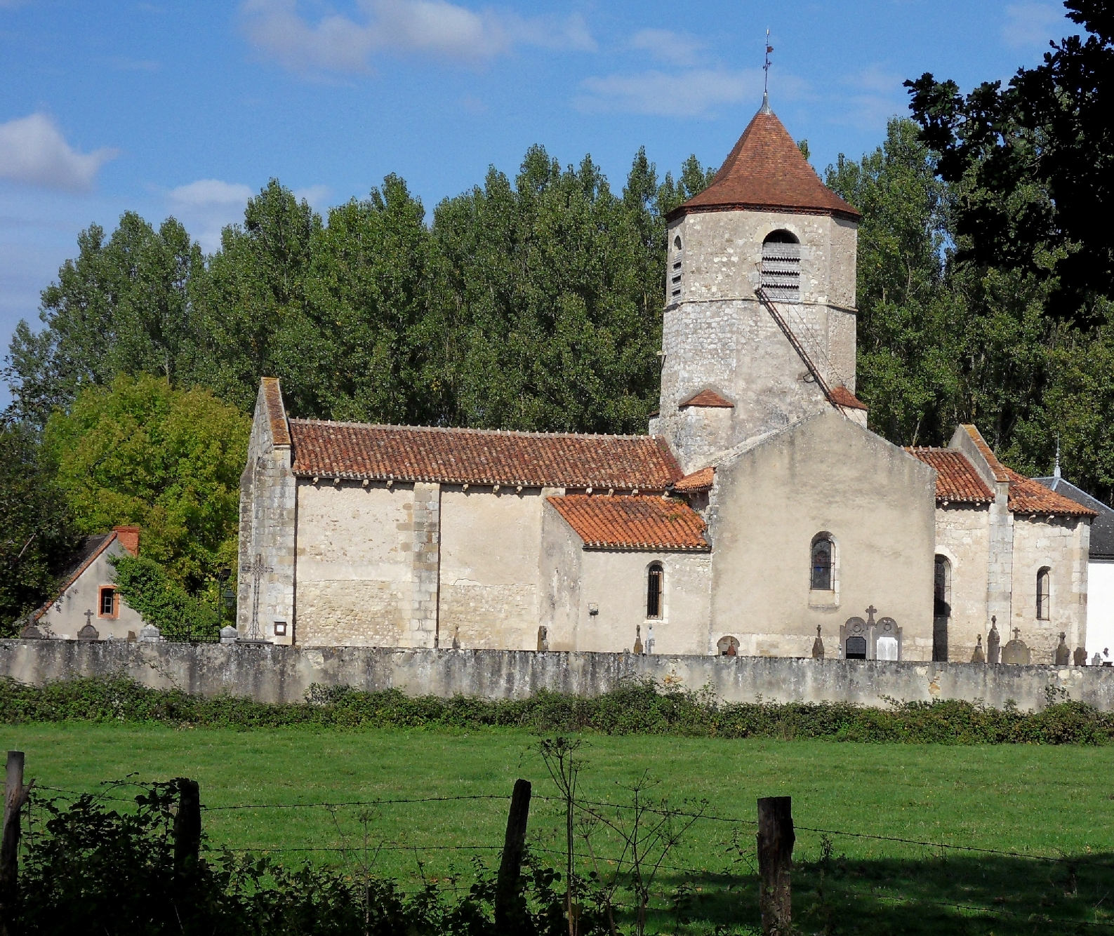 Église Saint-Martial, (Classé, 1945) .